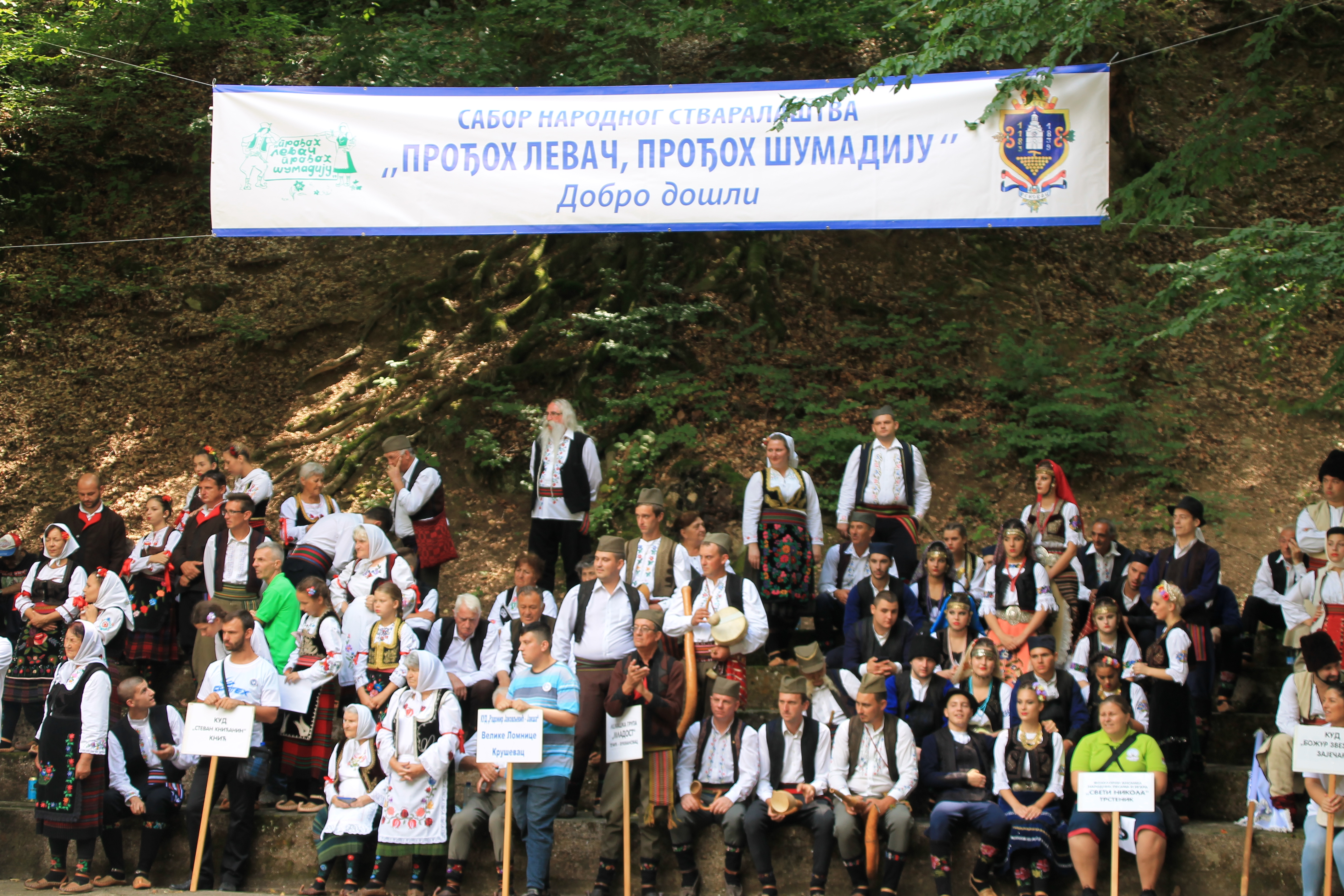 Sabor Prođoh Levač, prođoh Šumadiju